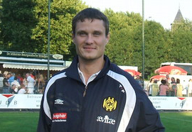 Foto van Andres Oper, gemaakt op zaterdag 14 juli 2007 bij de oefenwedstrijd SV Heerlen - Roda JC.